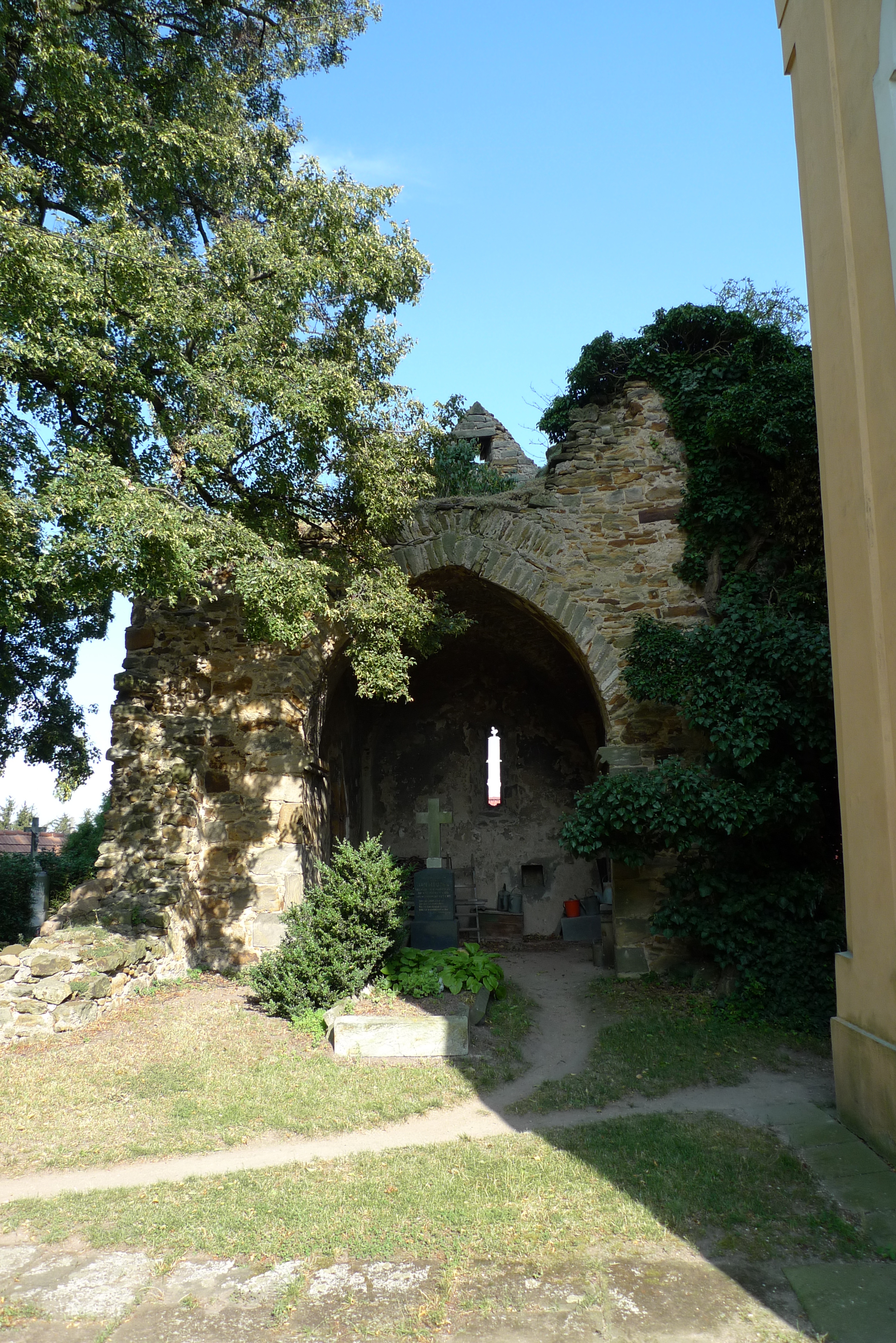 Česky: Zřícenina románského kostela sv. Martina na hřbitově ve Vyšehořovicích v okrese Praha-východ.